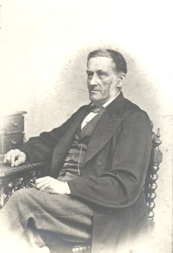 Alexander Petzholdt, saksa põllumajandusteadlane